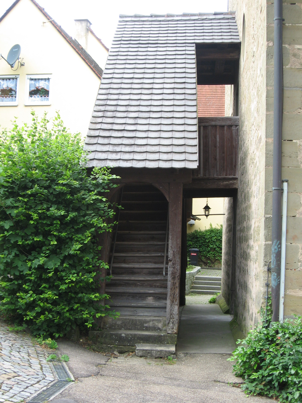 Obersontheim, evangelische Pfarrkirche, Blick auf die SE-Treppe des hölzernen Emporenaufgangs